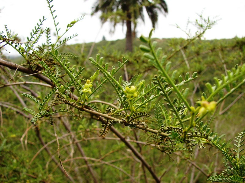 Santuario de la Naturaleza Palmar El salto. Quebrada Rodelillo